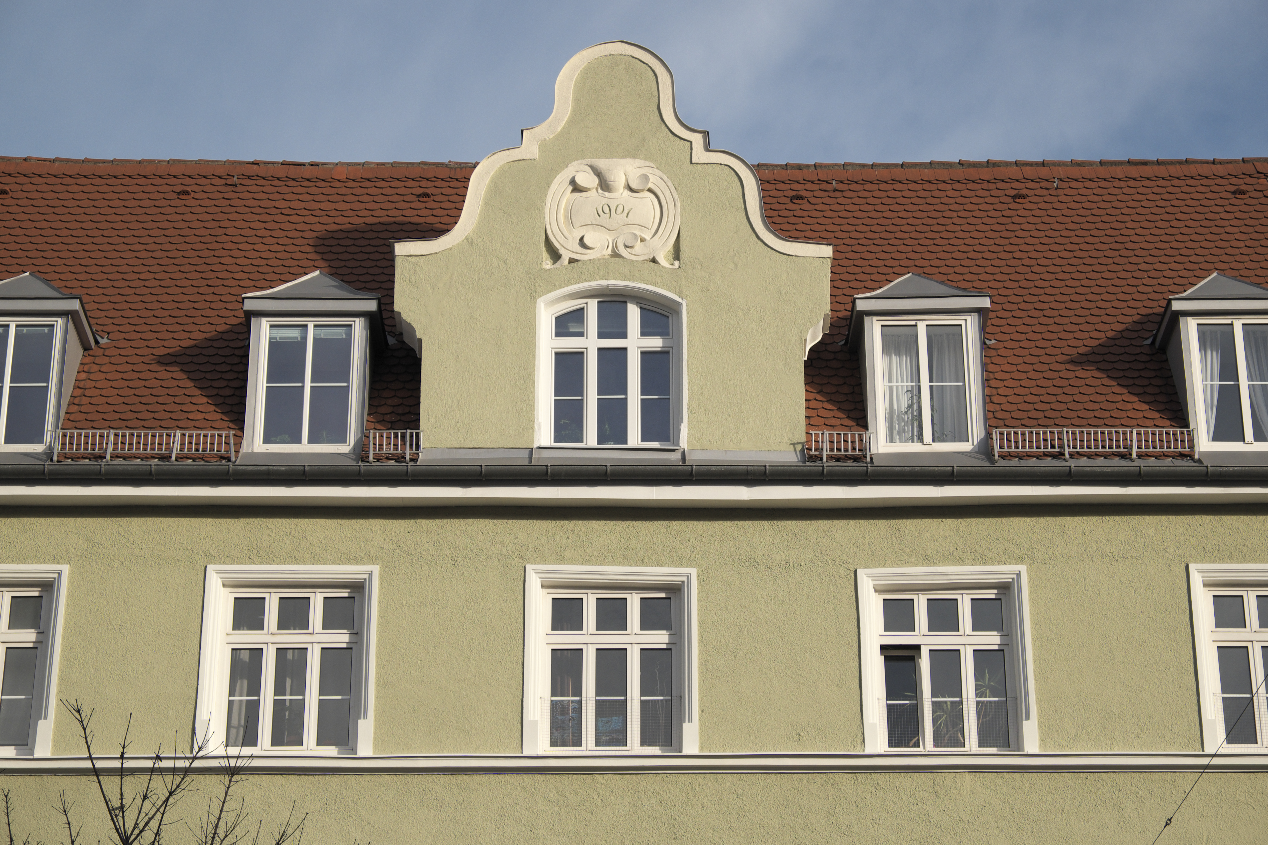 Mietshaus in der Donnersbergerstraße 44a in Neuhausen im Stadtbezirk Neuhausen-Nymphenburg in München (Bayern/Deutschland), mit der Jahreszahl 1901, von Eduard Müller